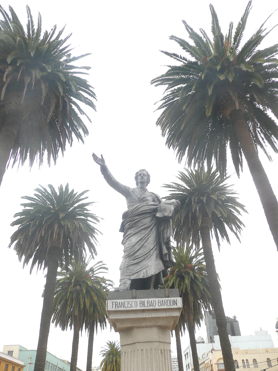 Francisco Bilbao Barquín (Santiago, Chile, 9 de enero de 1823 - Buenos Aires, Argentina, 19 de febrero de 1865). Escritor, filósofo y político chileno con ascendencia de tipo vasco;[1] por sus ideas liberales lo llamaron el Apóstol de la libertad.